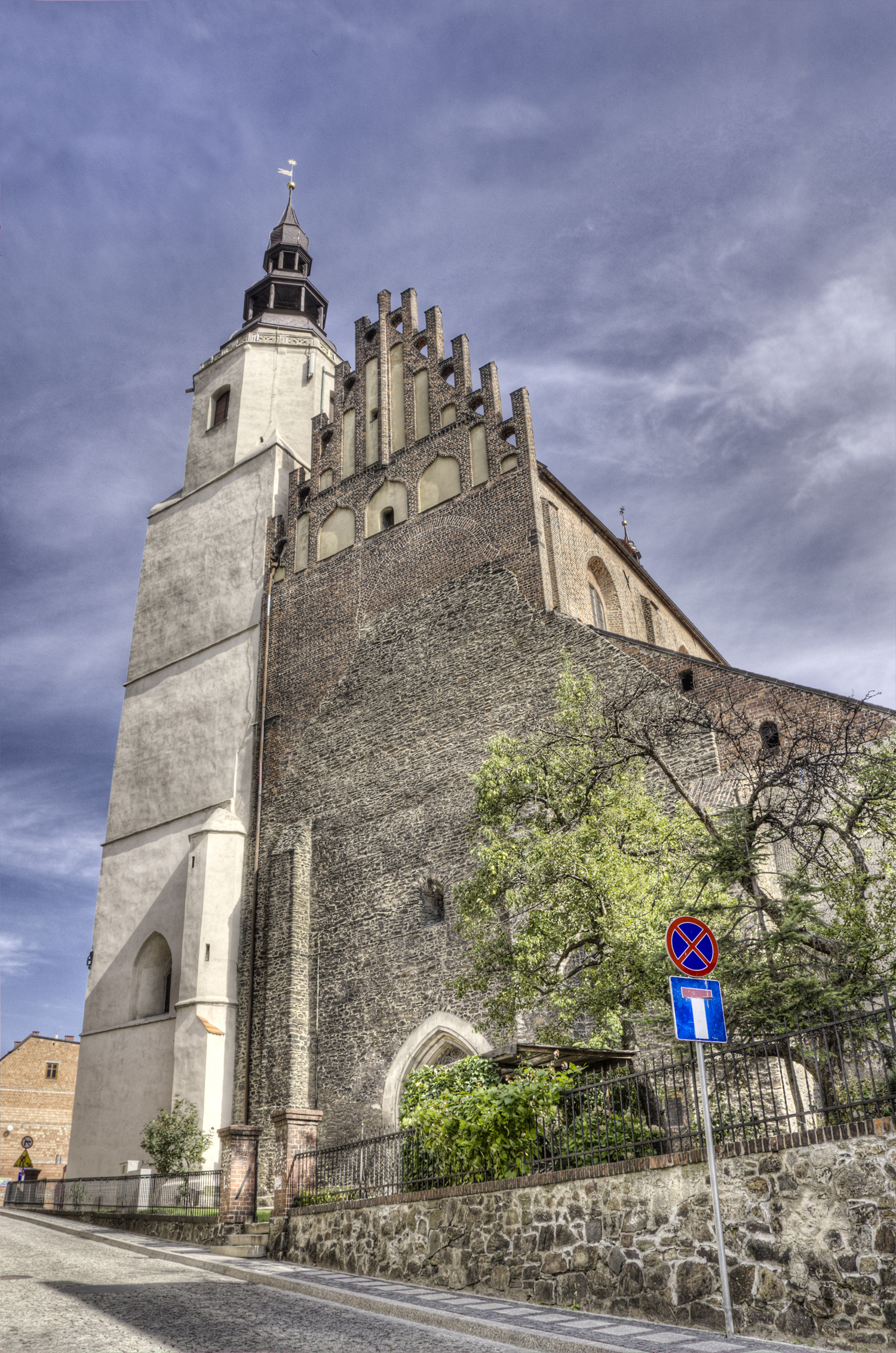 kościół paraf. pw. św. Jerzego Dzierżoniów, Kościelna, Dzierżoniów